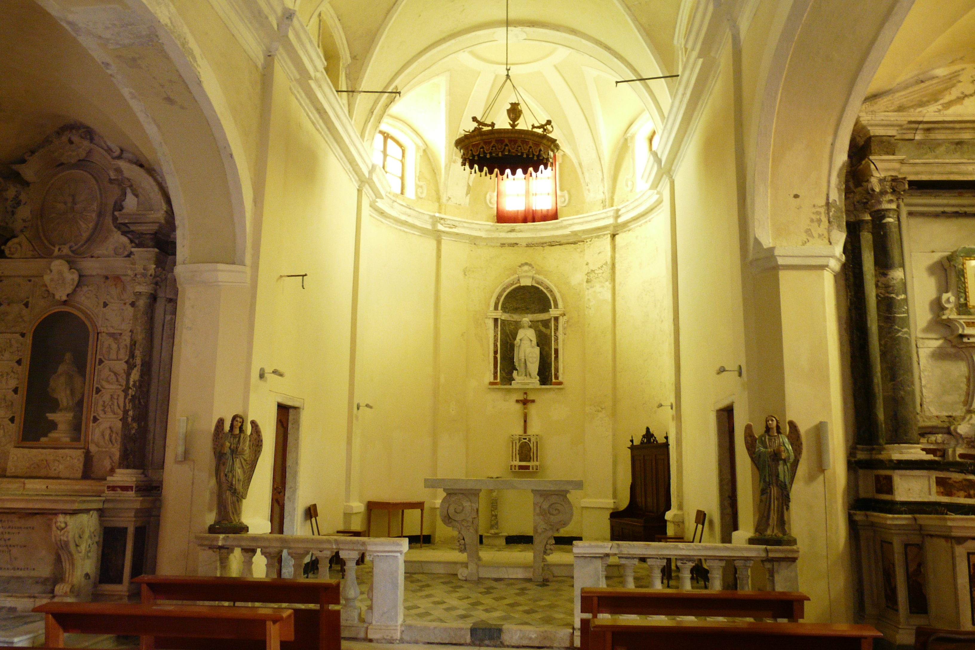 Chiesa di San Giorgio, Tellaro, Lerici, Liguria, Italia